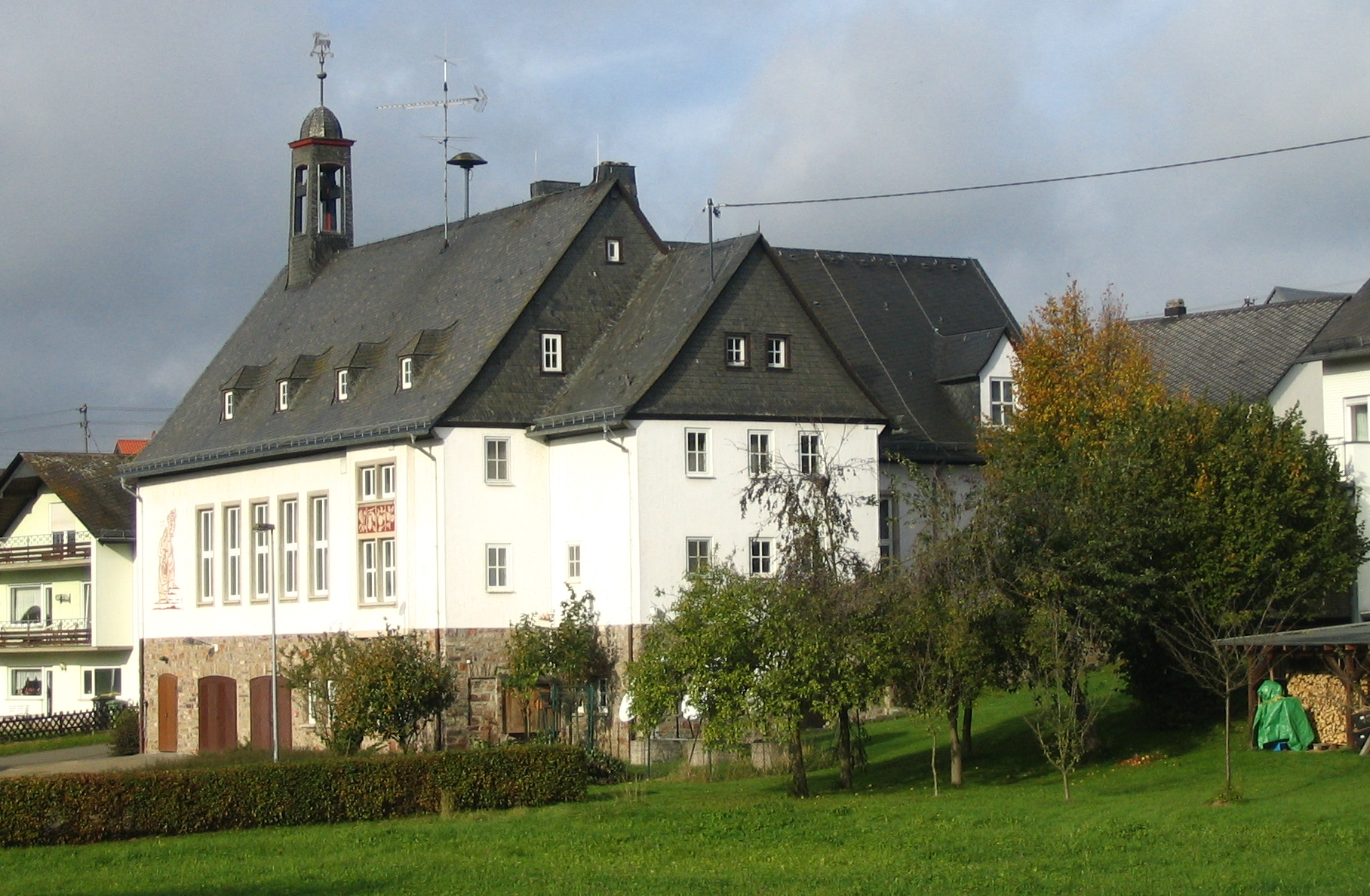 Gemeindehaus im Dorfzentrum am Simmerbach.